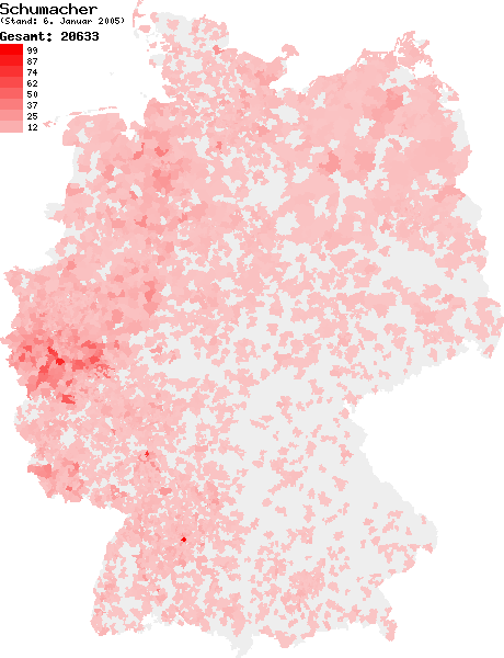 Verteilung des Nachnamens Schumacher in Deutschland nach dem Telefonbuch mit Stand vom 6. Januar 2005